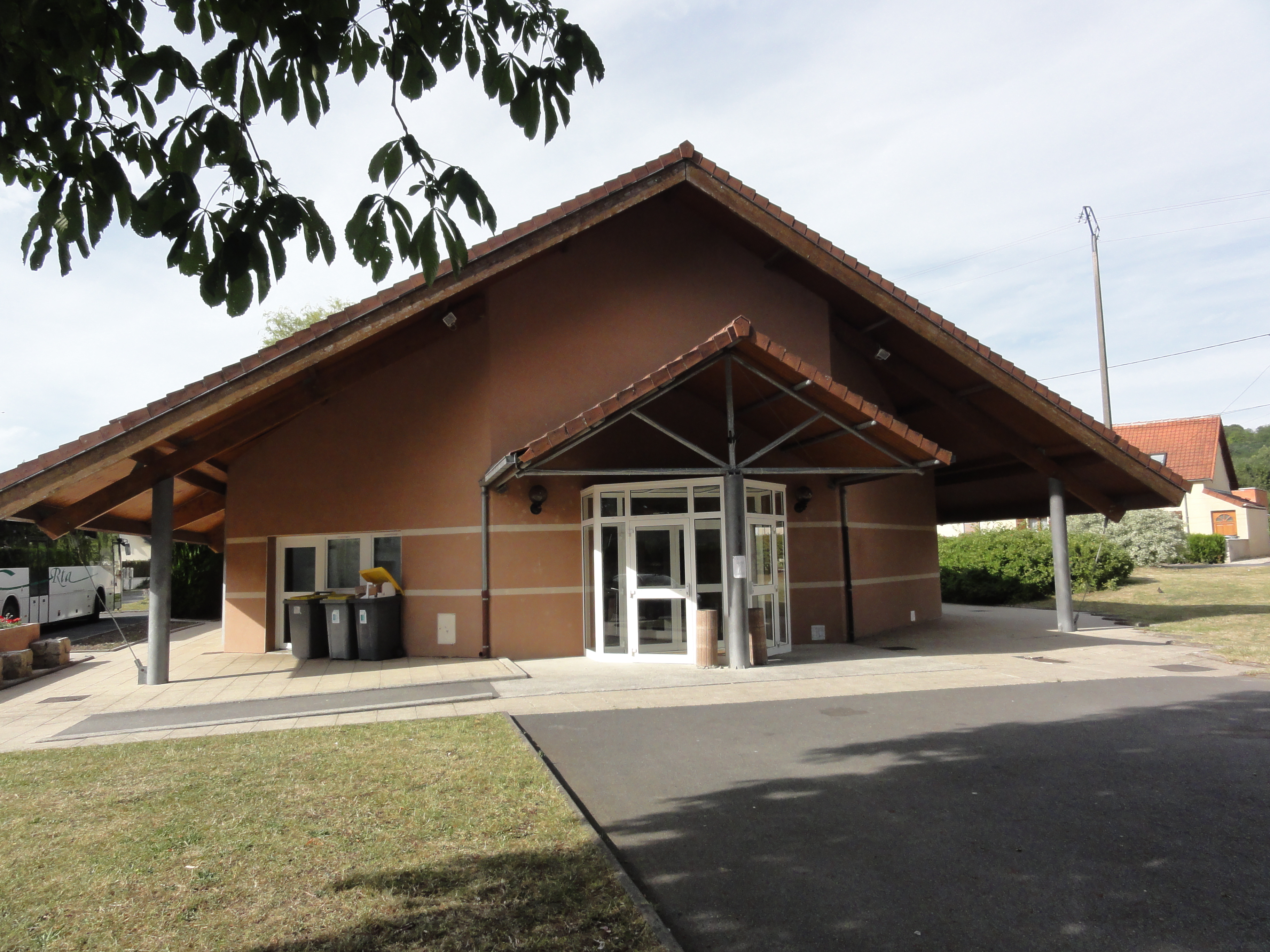 Mauregny-en-Haye (Aisne) salle des fêtes